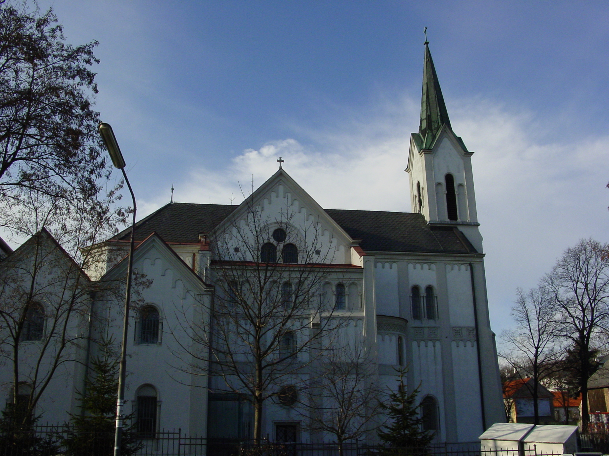 katholische Erlöserkirche in Wien-Liesing